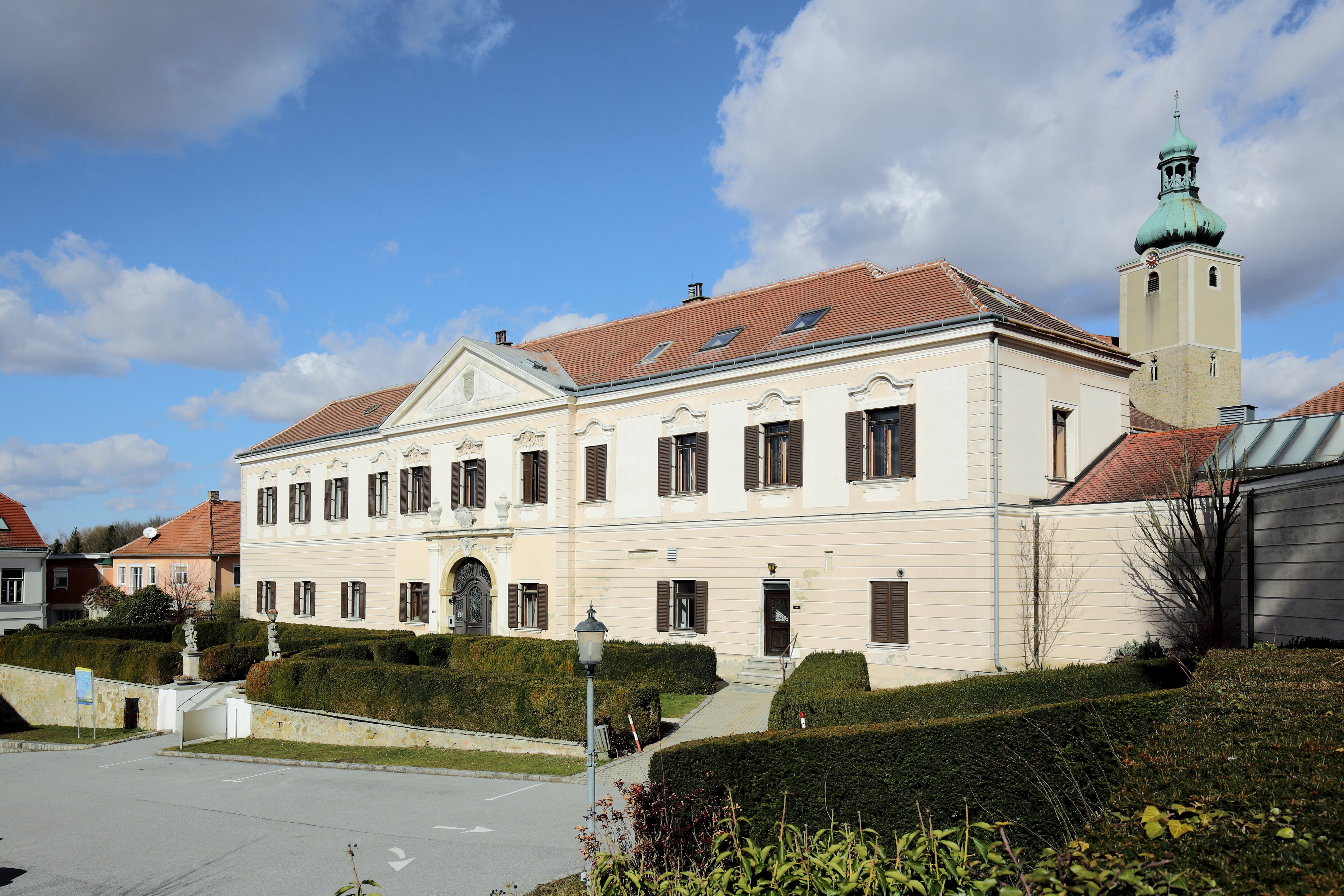 Südwesttrakt des Schlosses und Bildungshauses der Erzdiözes Wien in der niederösterreichischen Marktgemeinde Großrußbach. Die elfachsige spätbarocke Fassade stammt lt. Inschrift aus dem Jahr 1739.